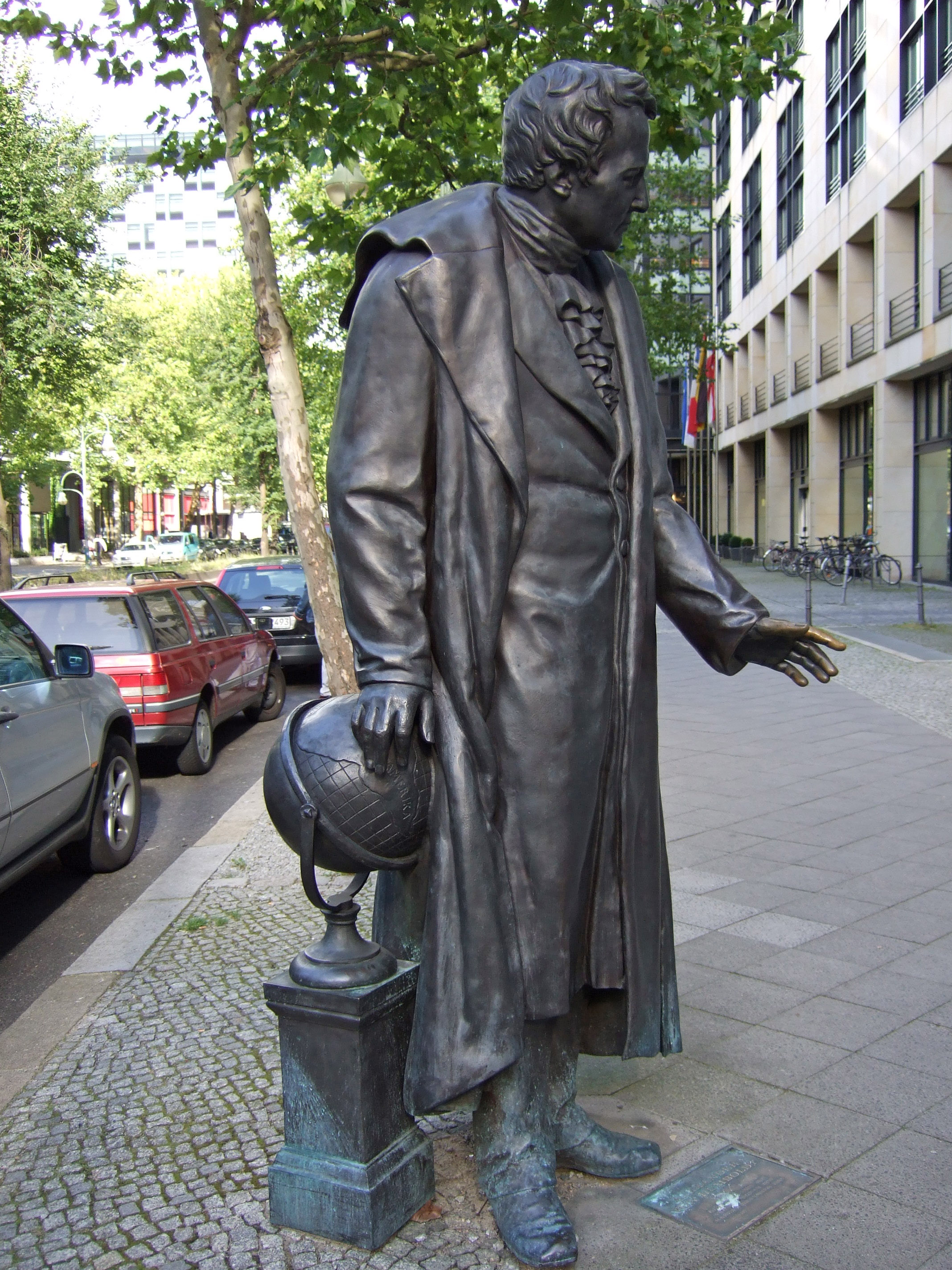 Nach dem Humboldt-Standbild am Reiterstandbild Friedrich Wilhelms III. am Kölner Heumarkt.